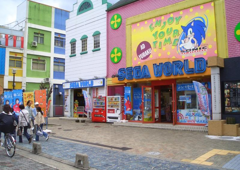 シネマデプト友楽EAST